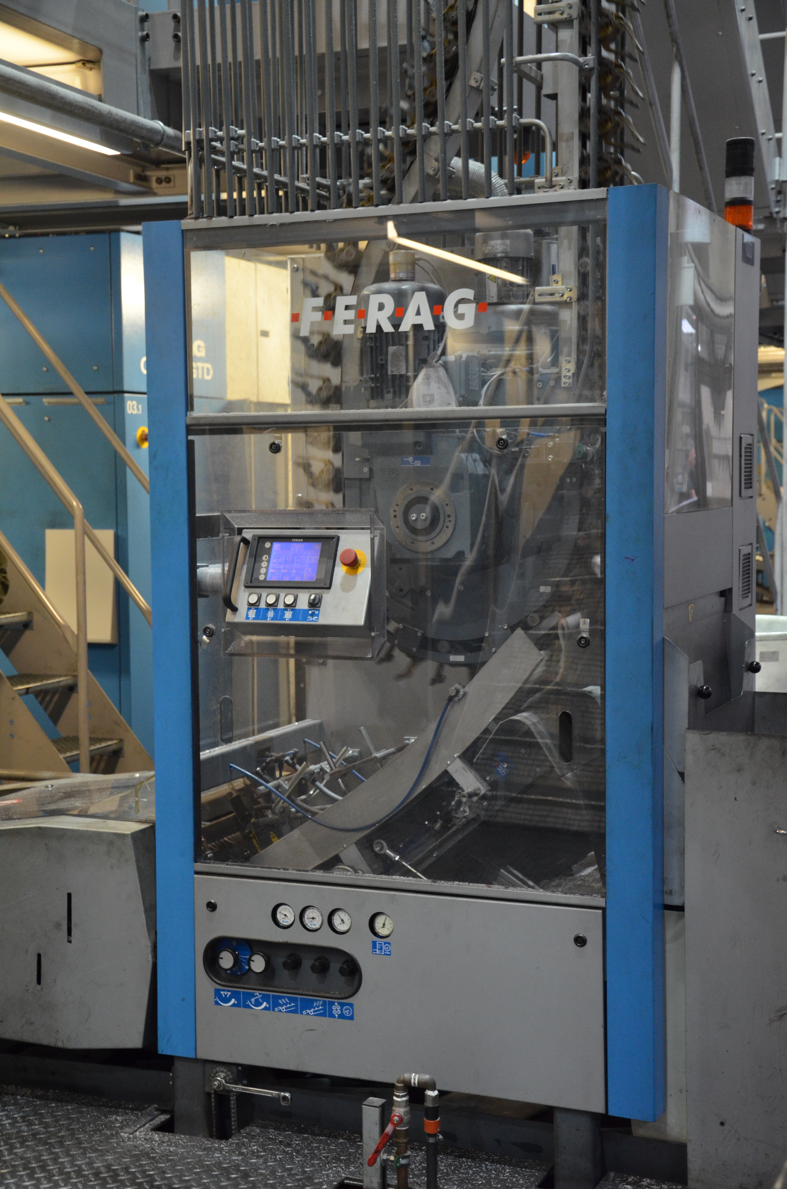 Druckhaus der WAZ Mediengruppe in Essen. FERAG zum Einzelfassen der Zeitungen.